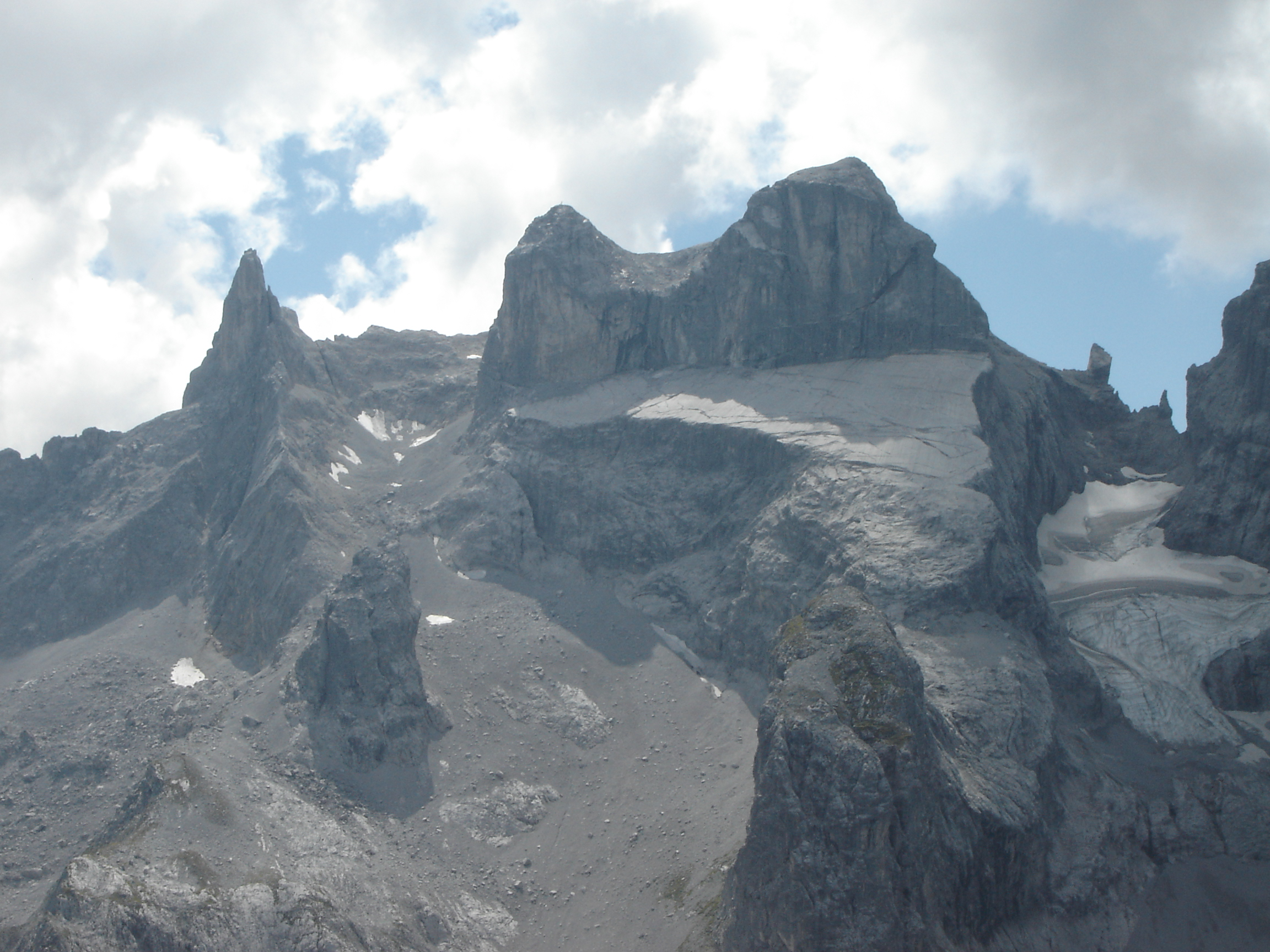 3 Drusentürme